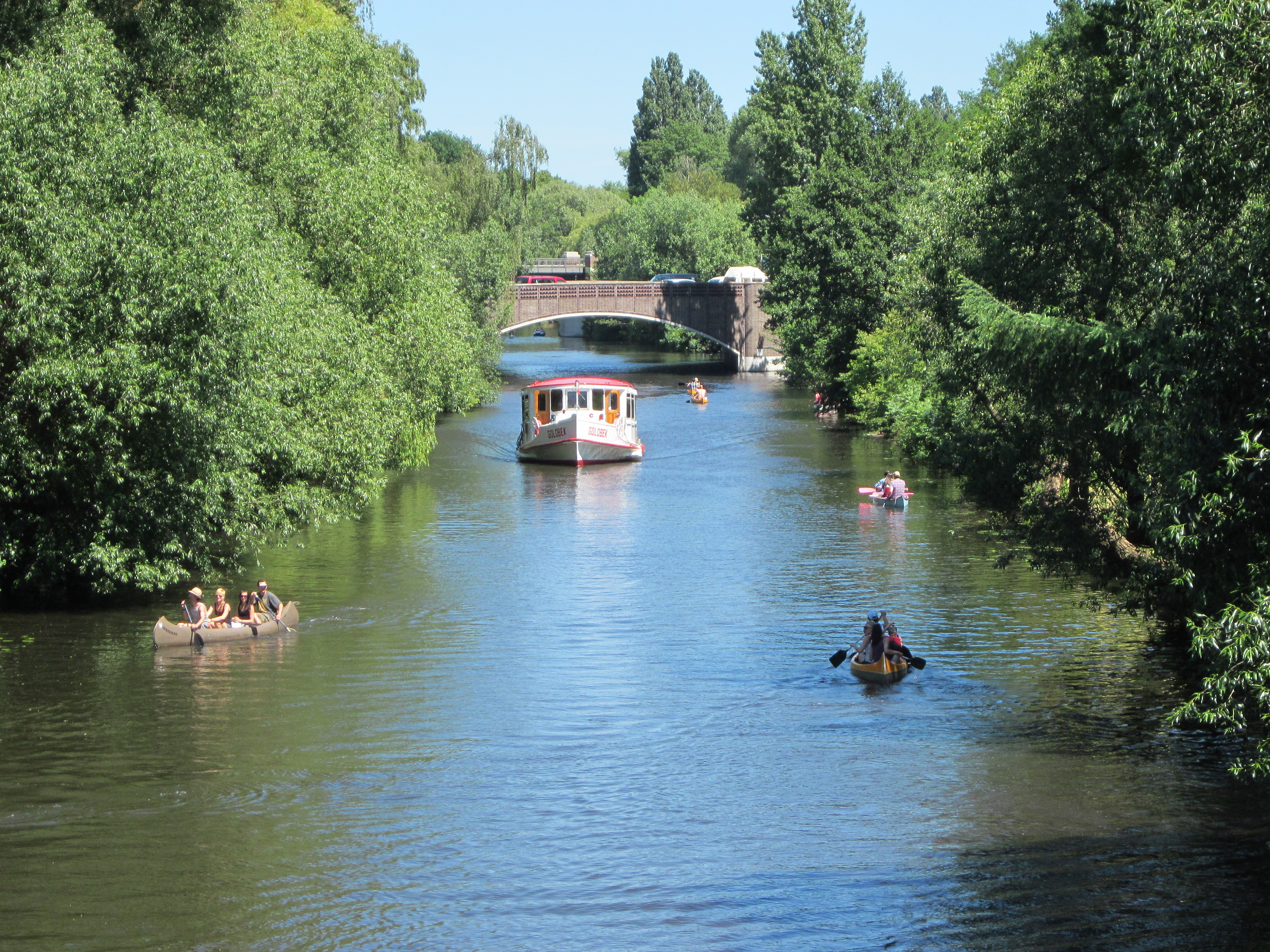 Der Alsterdampfer Goldbek auf dem gleichnamigen Kanal in Winterhude zwischen Wiesendammbrücke (hinten) und Barmbekerstrassenbrücke (Standort des Photographen).